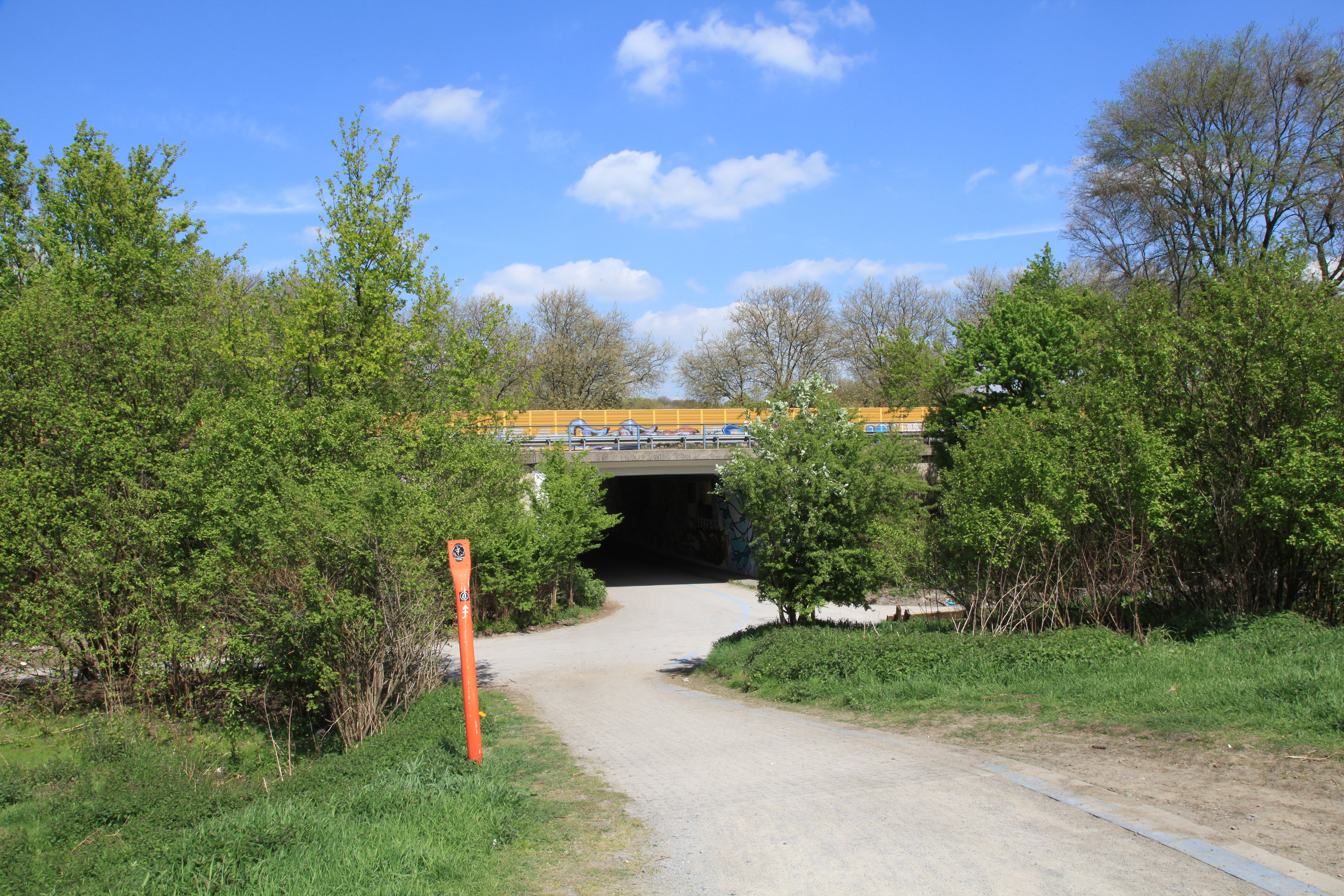 Brache Vondern und Autobahnbrücke Vondern der A42 in Oberhausen